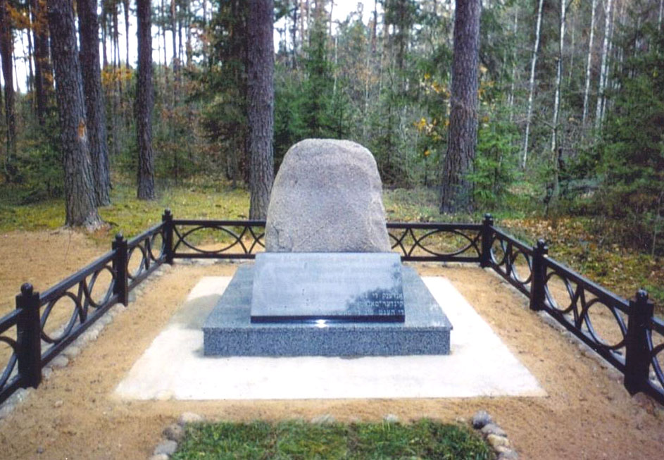 Памятник на месте убийства в апреле 1942 года нацистами и полицаями 84 еврейских детей из гетто, созданного в санатории Крынки Осиповичского района.